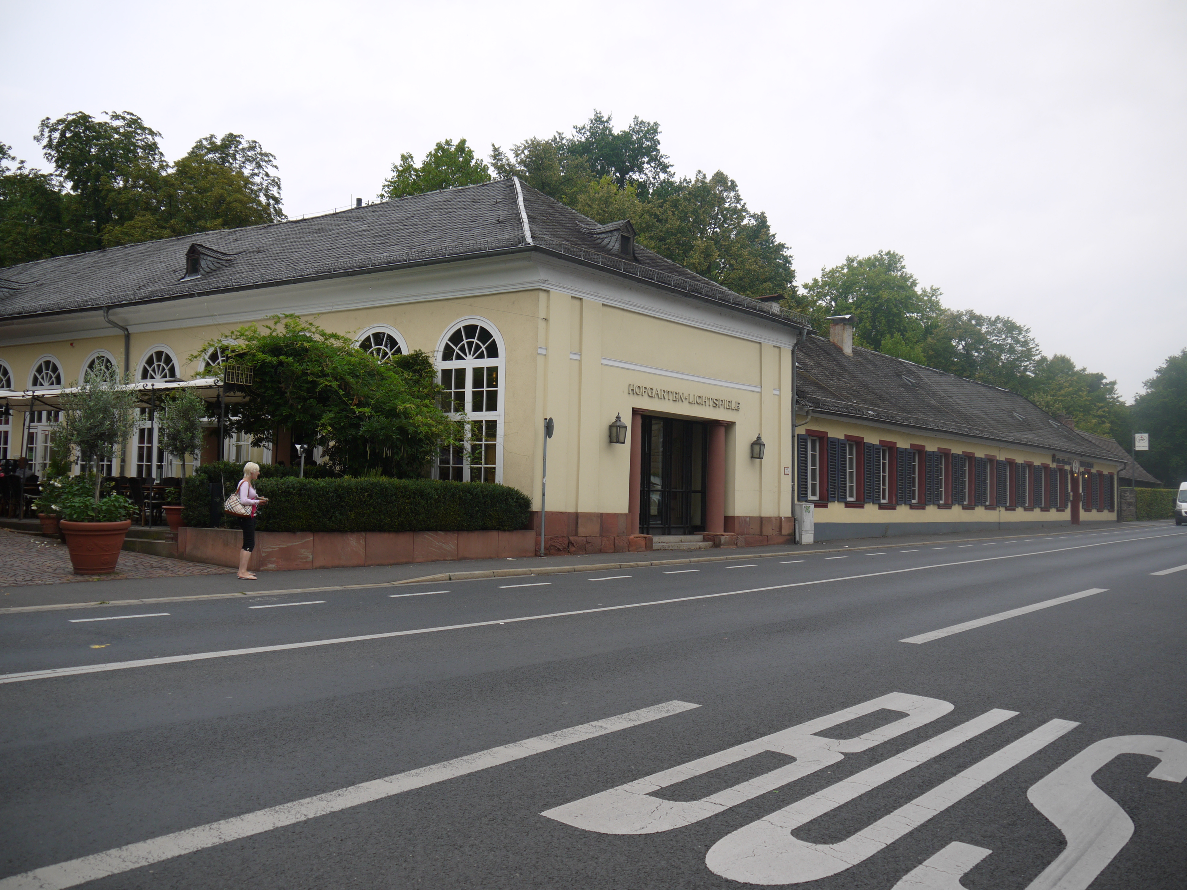 Hofgartenstraße 1 und 1a, (ehem. Orangerie, heute Hofgarten-Kabarett und Gaststätte mit Biergarten), denkmalgeschütztes Gebäude in Aschaffenburg